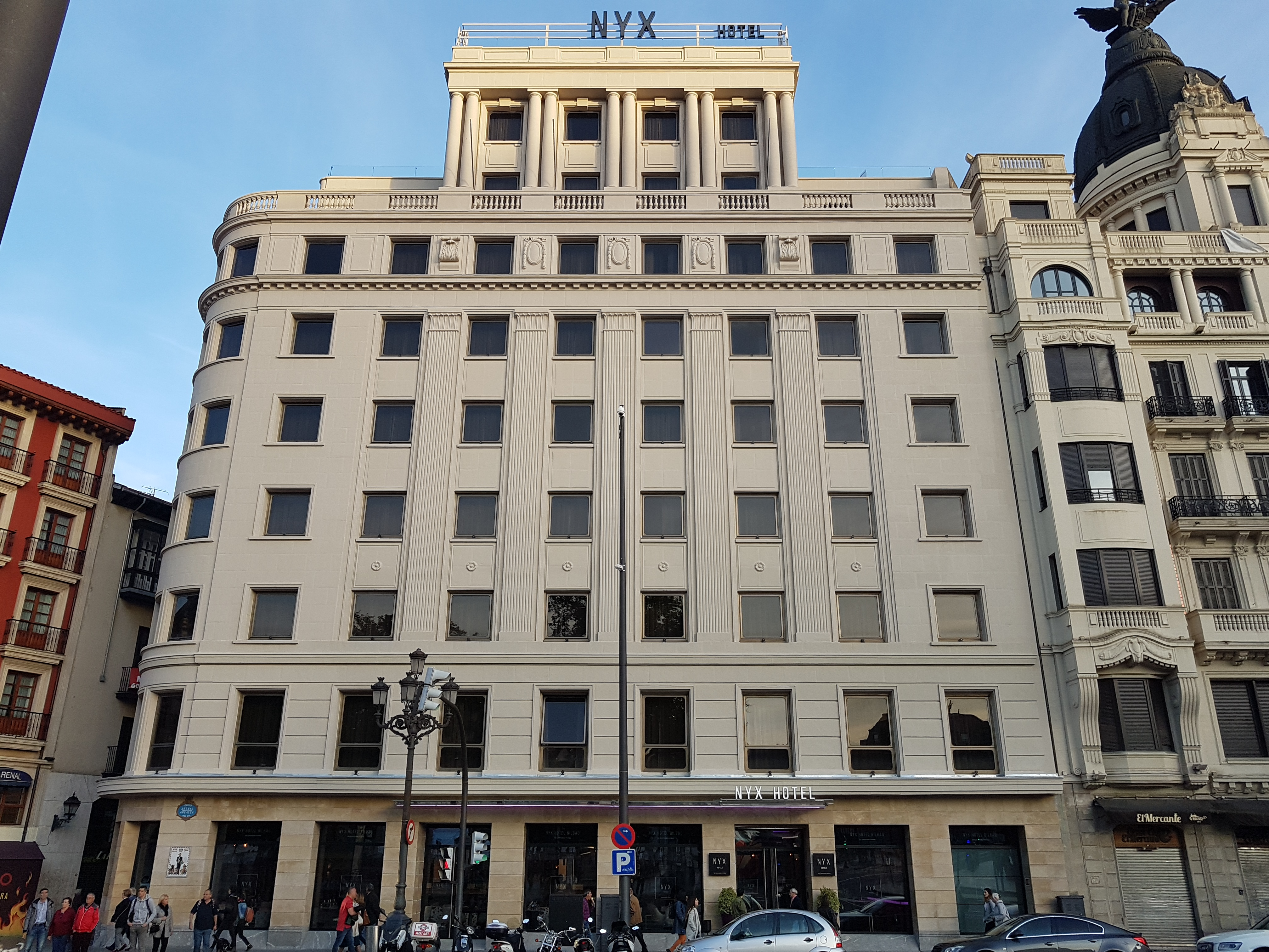 NYX Hotel Bilbao.